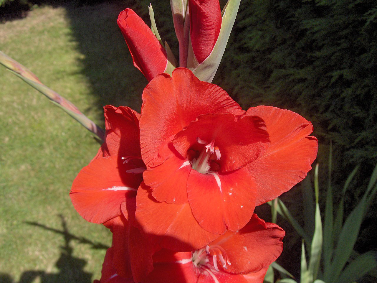 Cultivar Gladiolus 'Red Cascade' Family Iridaceae